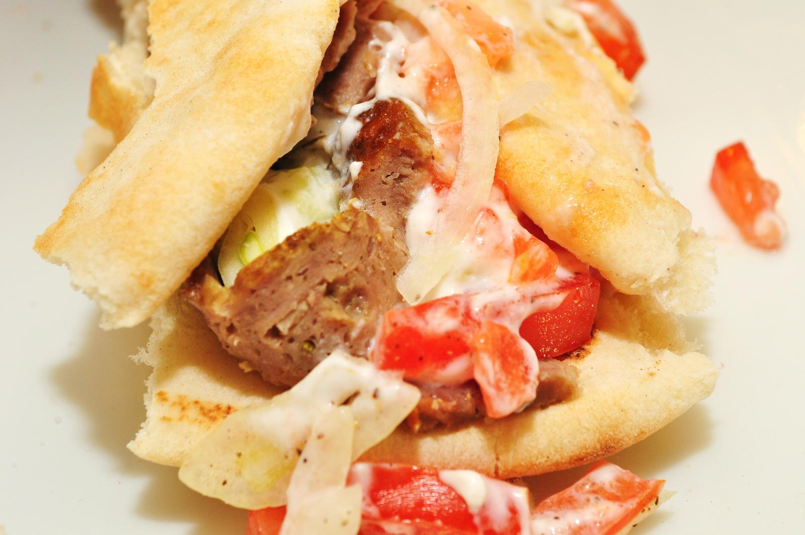 A gyro sandwich